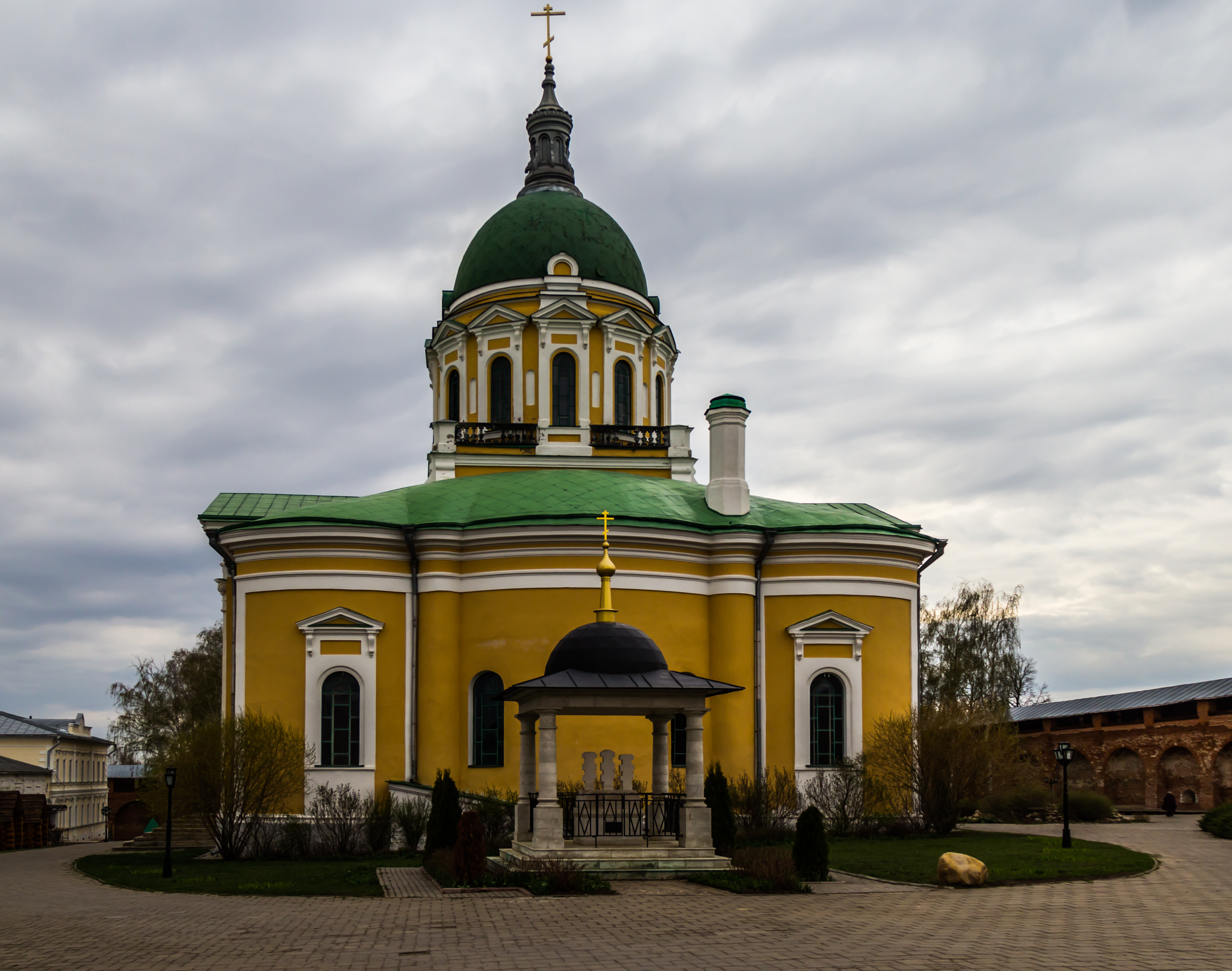 Zaraysk, Moscow Oblast, Russia